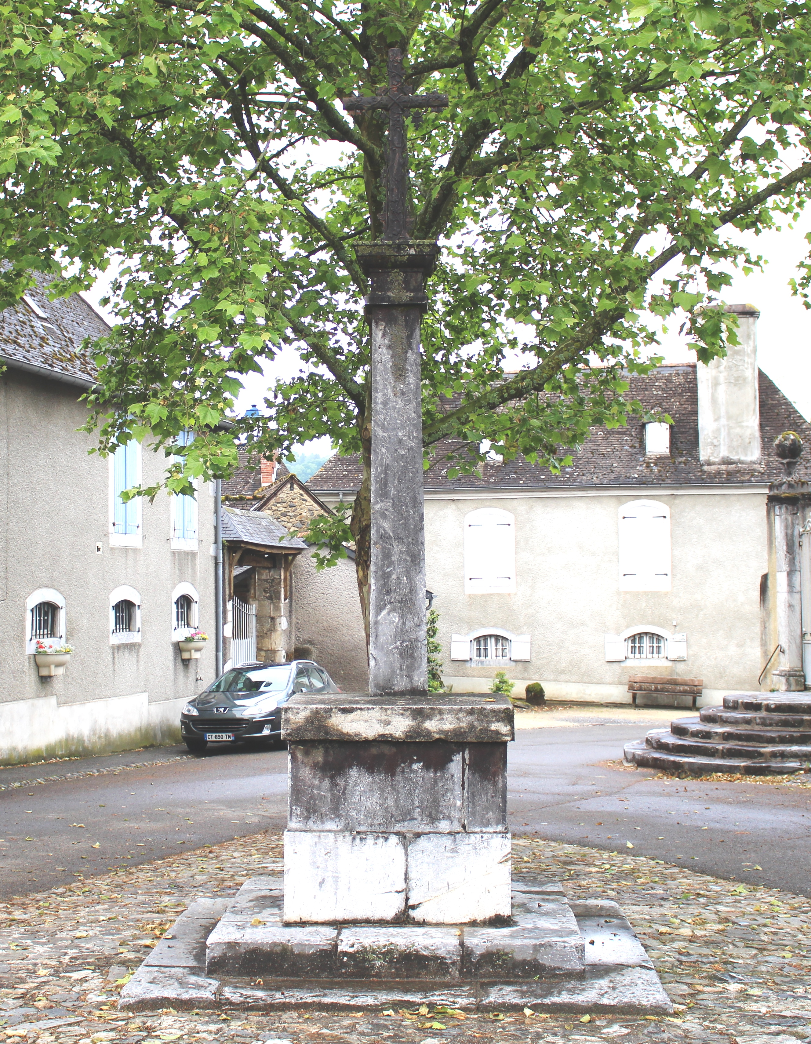 Croix de Loubajac (Hautes-Pyrénées)